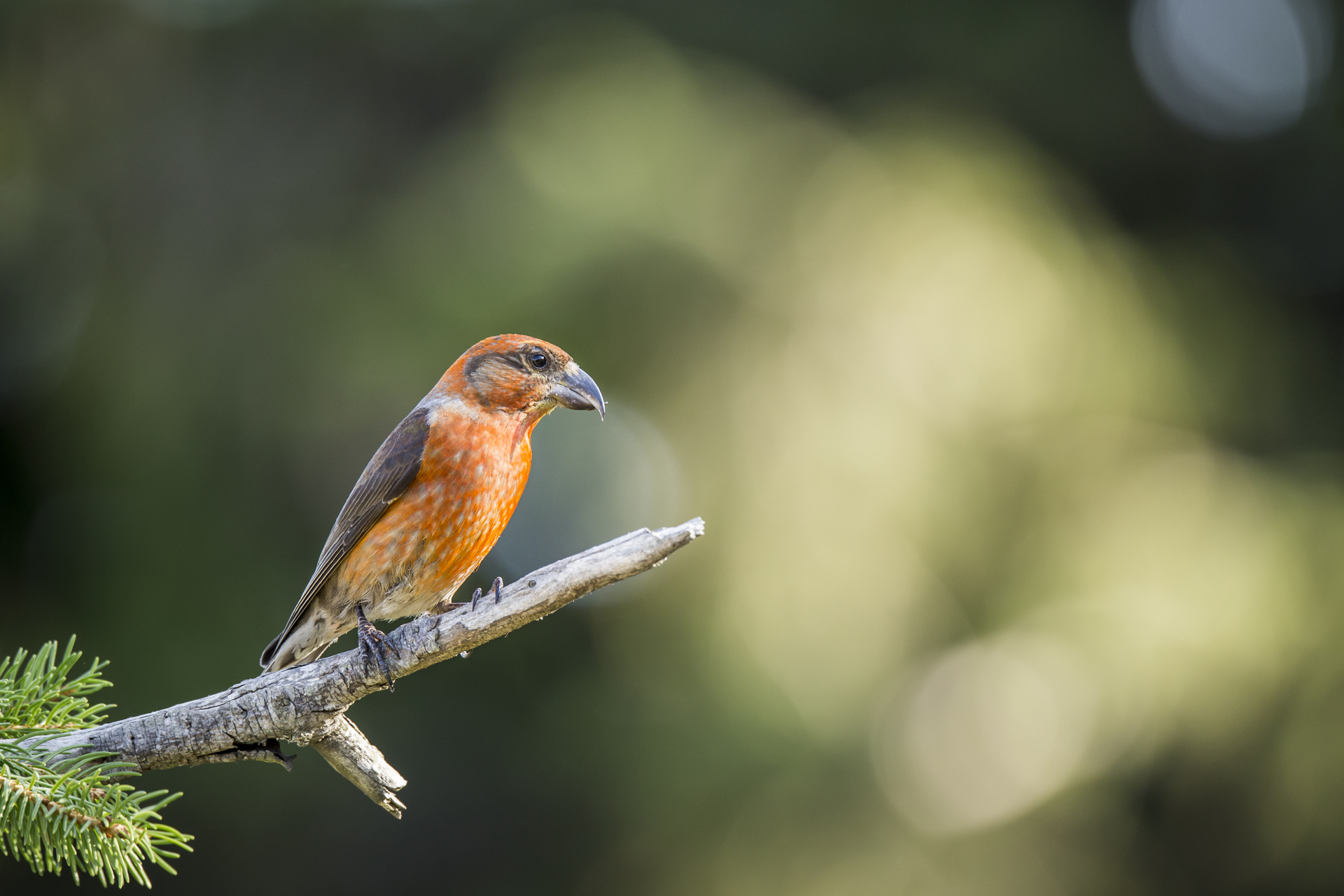 Monte Baldo Est (Q49962757)